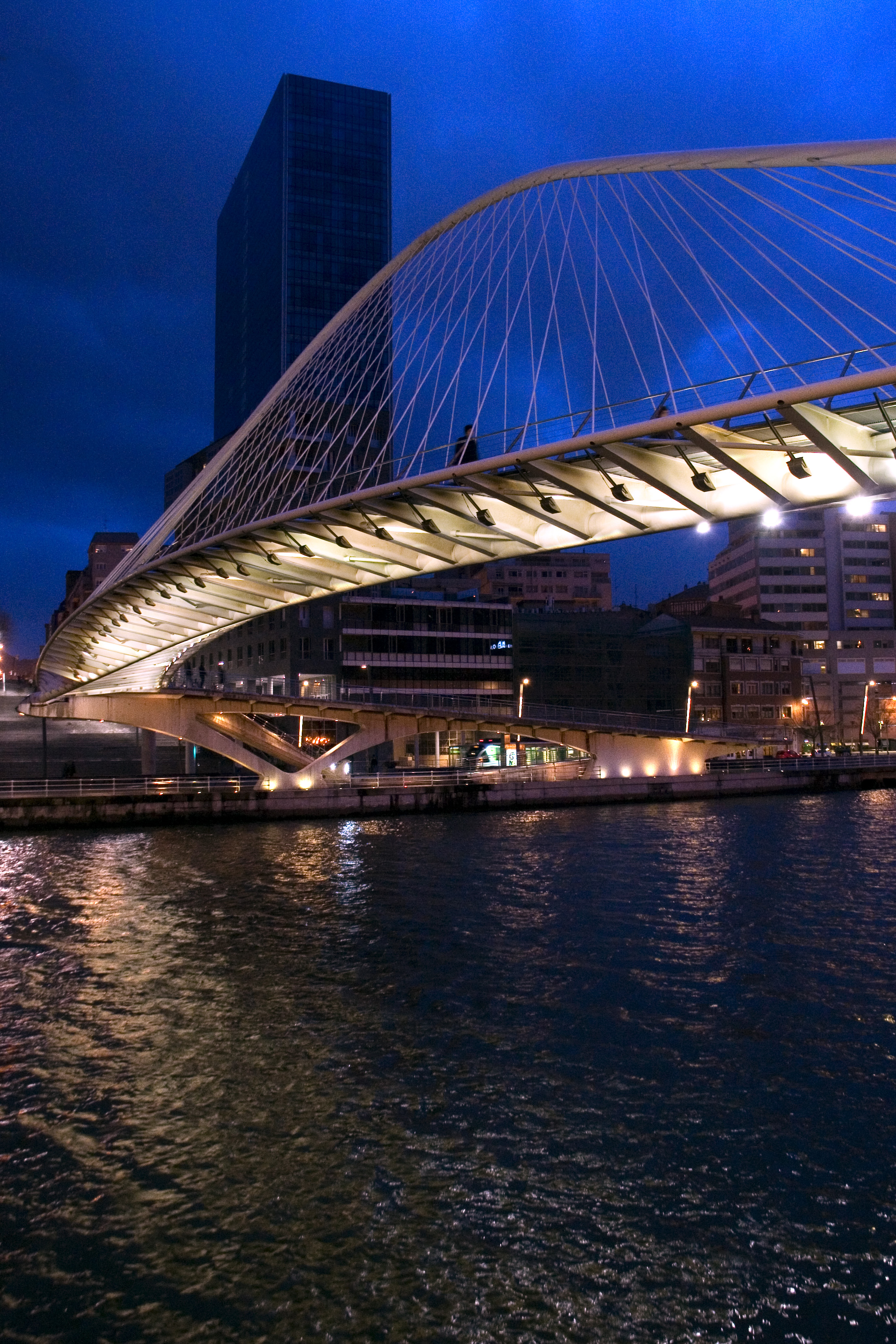 Zubizuri bridge at nignt